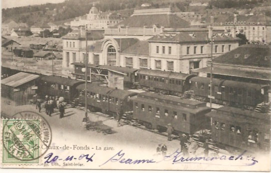 Les quais de la gare de la Chaux-de-Fonds avec les trains